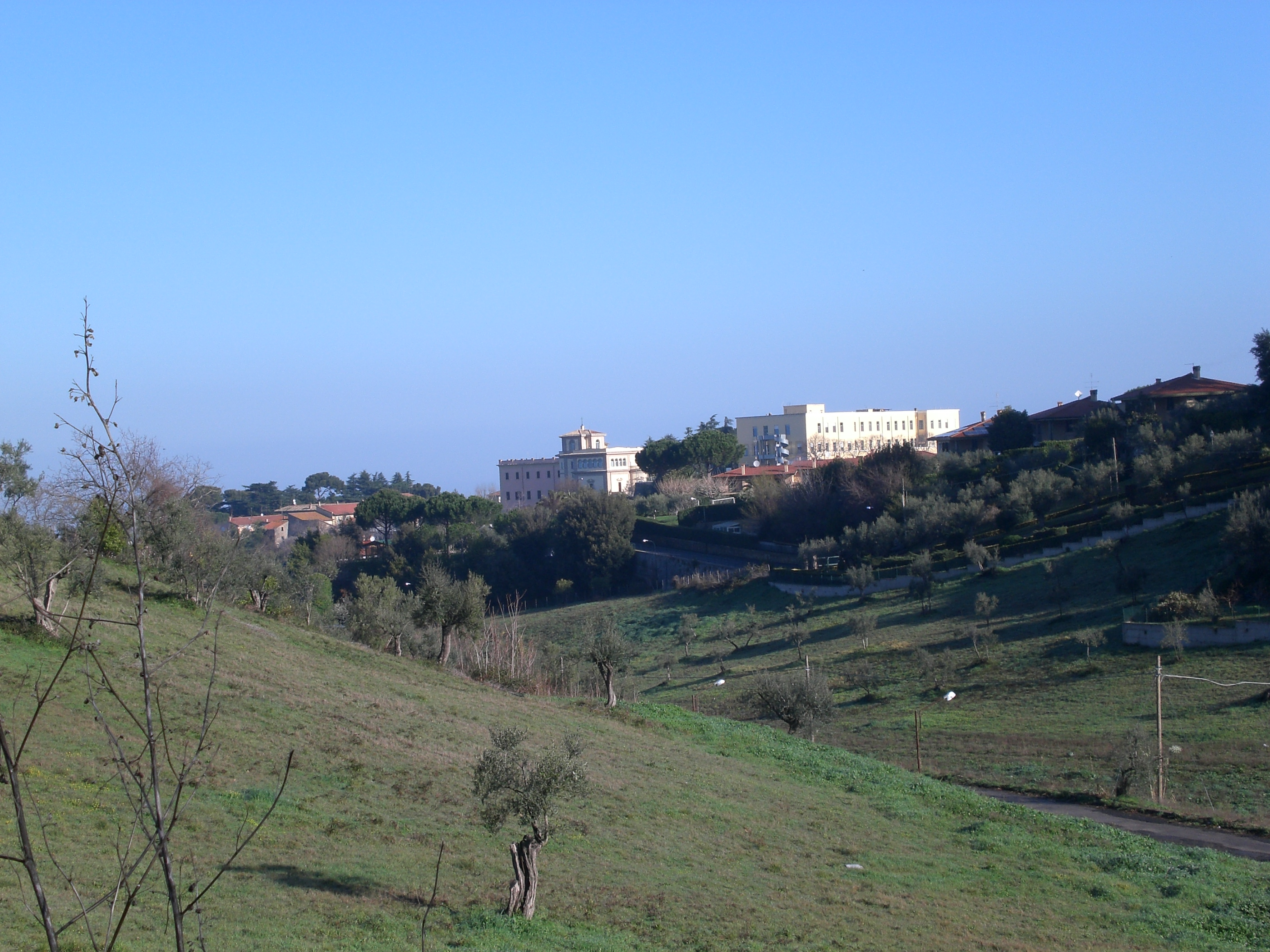 [èFrascati - Panorama con Villa Sora, lato sud, foto scattata da Luiclemens